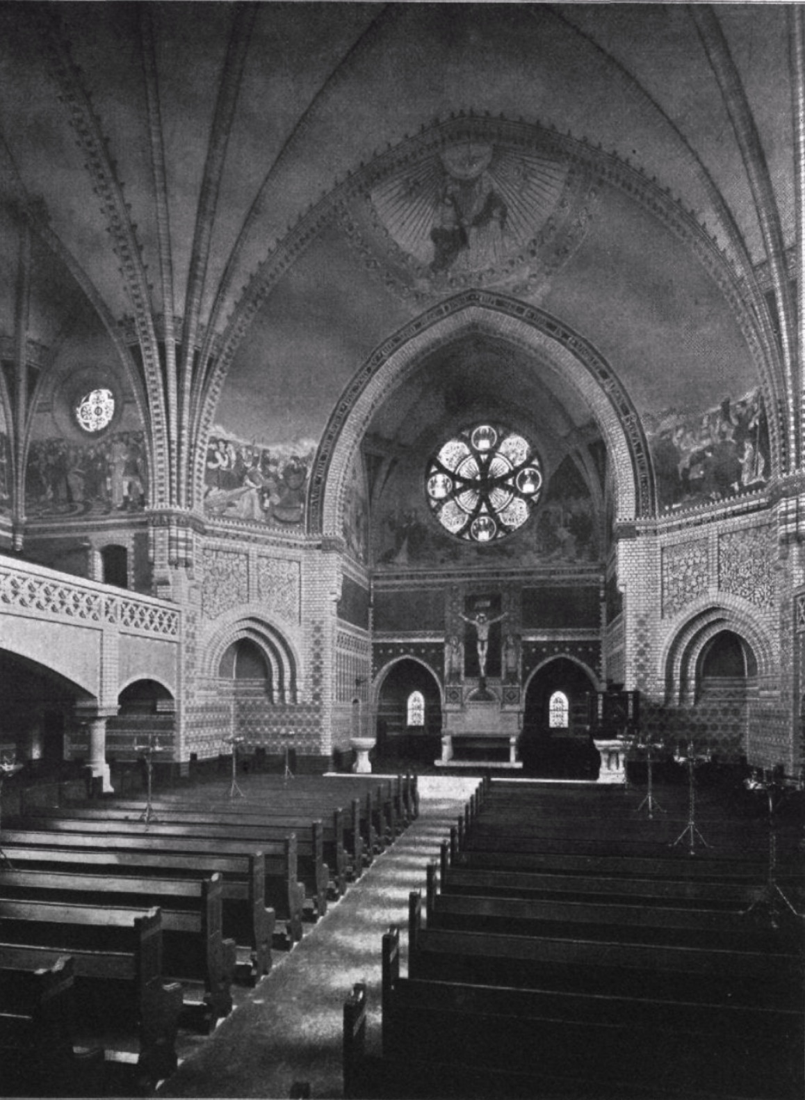 Chor der Trinitatiskirche, Berlin-Charlottenburg